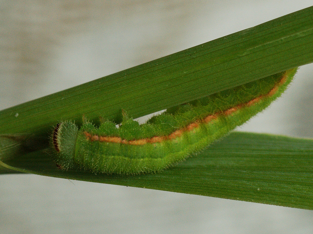 Exemplar found: Russia, Moscow Oblast, Odintsovsky District, near station 192nd kilometer, 14.06.2015, in grass, days МО, Одинцовский р-н, окрестности платформы 192 км., 14.06.2015, выкошена из травы, днём